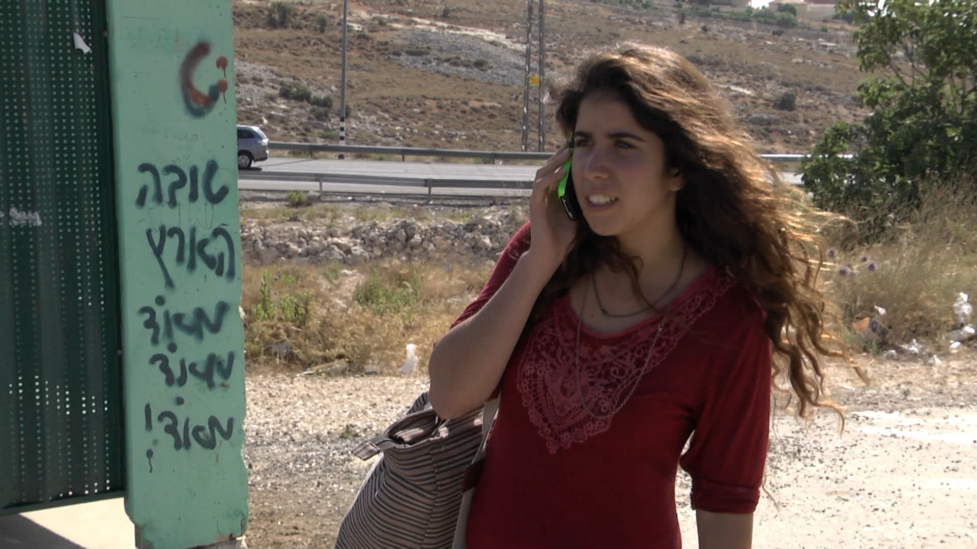 תירא-אל כהן בסרט מקום משלהן